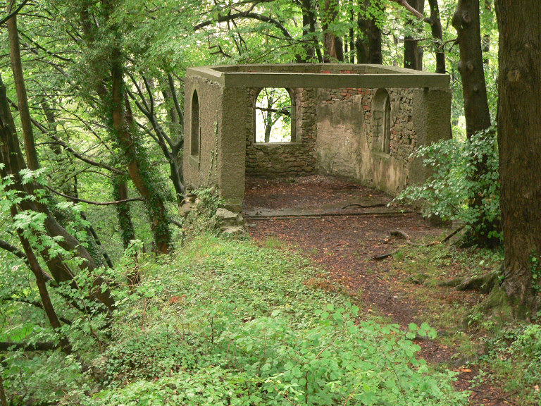 Burgruine Lauenstein, kapellartiges Gebäude etwa aus dem 19. Jahrhundert